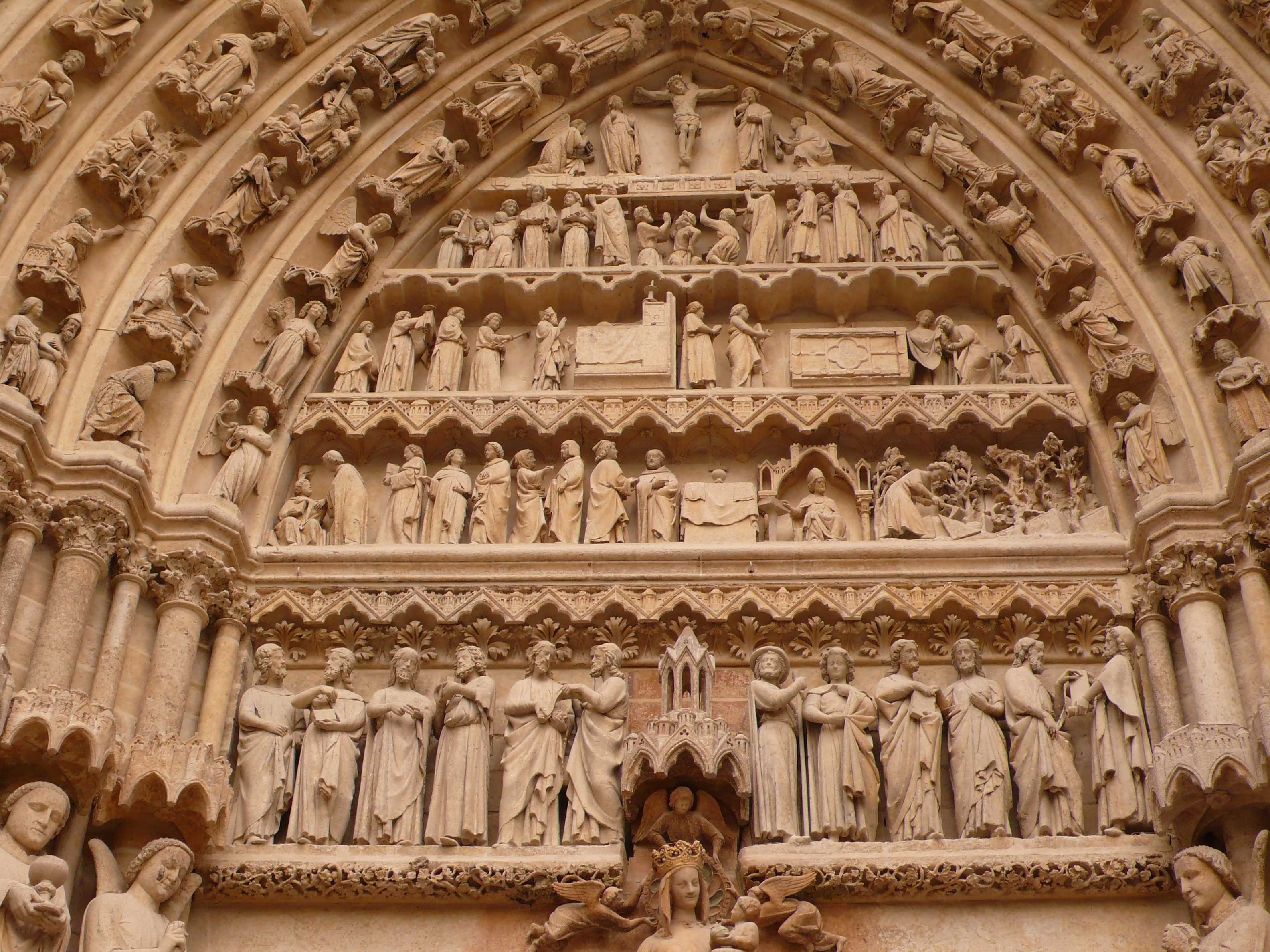 Kathedrale von Amiens, Frankreich, Tympanon des Südquerhausportals